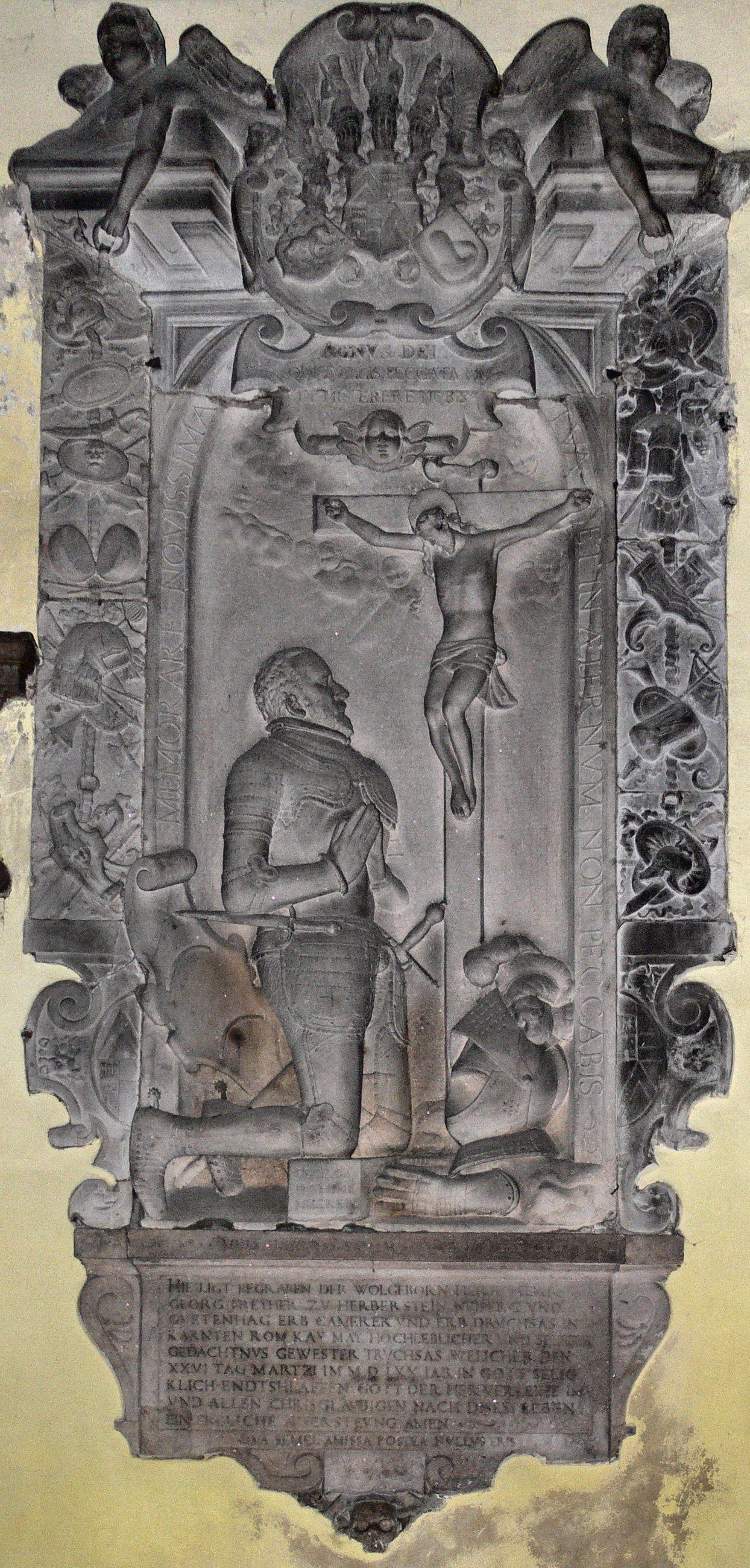 Wien, Michaelerkirche, Epitaph Georg von Herberstein, 1570 (weißer Marmor)